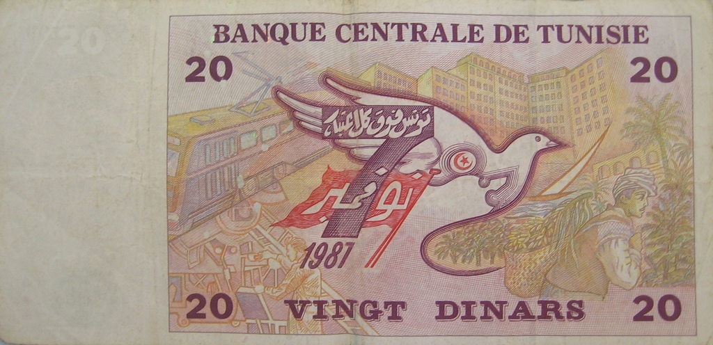 20 dinarów tunezyjskich - Revers